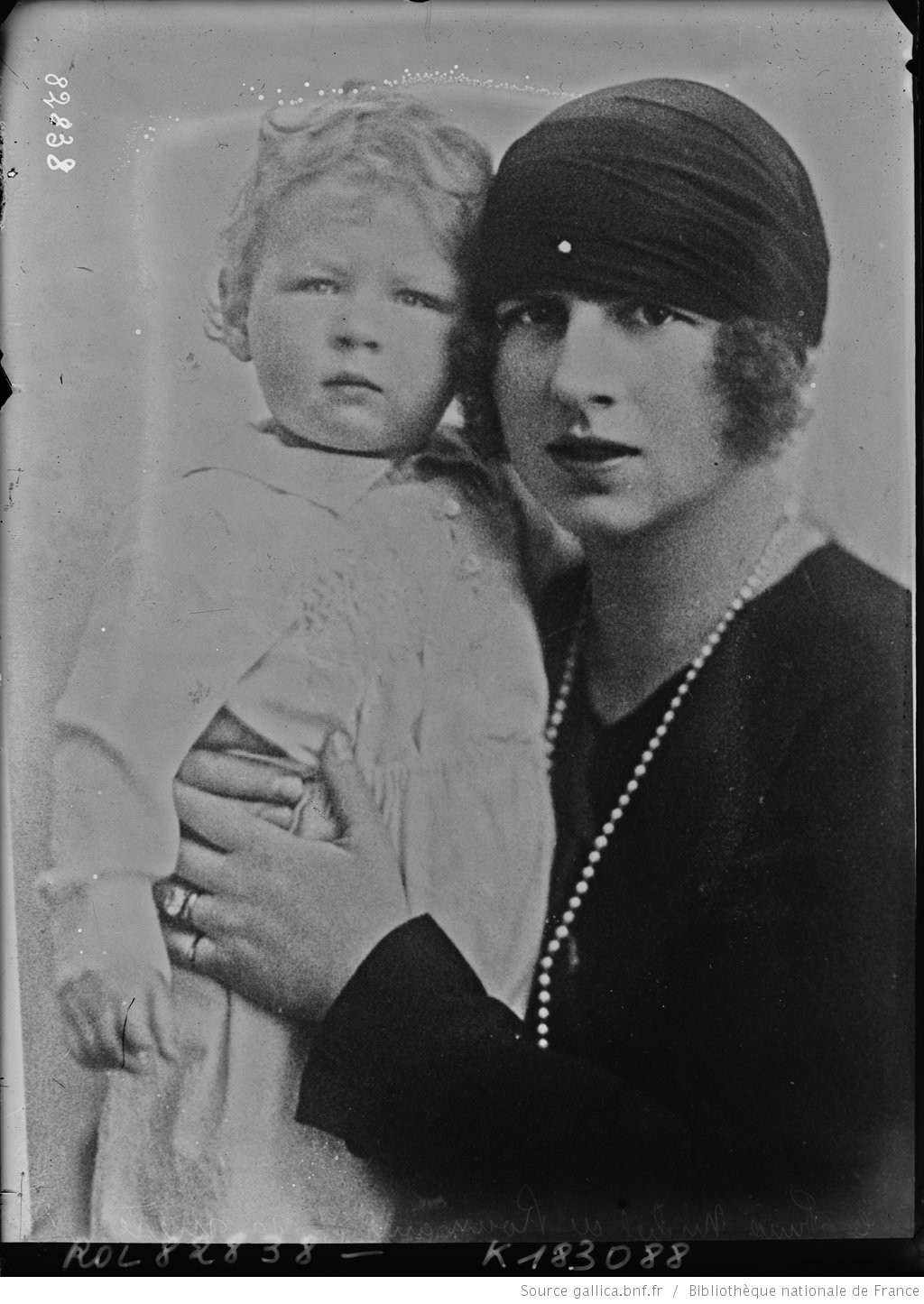 Princesa Elena de Grecia, Princesa Heredera de Rumania, con su hijo, el futuro Rey Michael I.